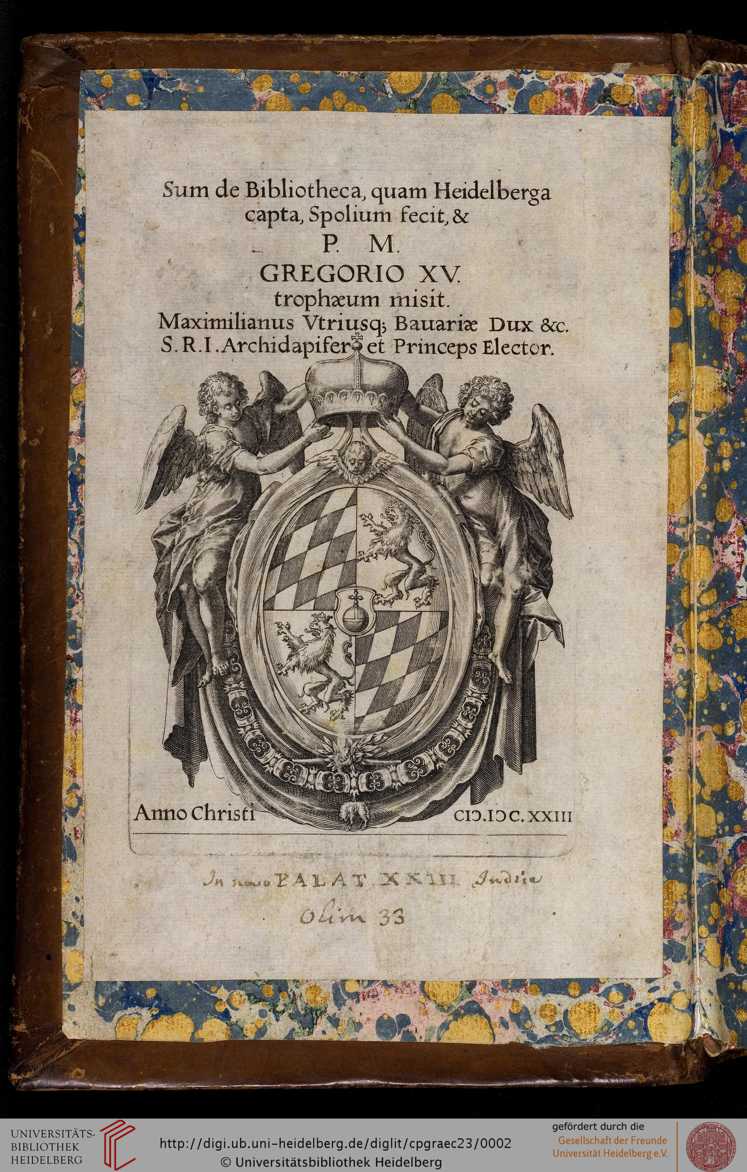 Byzantinische Handschrift aus der 2. Hälfte des 9. und 1. Hälfte des 10. Jahrhunderts, bezeichnet als Codex Palatinus graecus 23 aus der Universitätsbibliothek Heidelberg. Inhalt ist die Anthologia Graeca, hier der Vorderspiegel. Digitalisat gefördert durch die Gesellschaft der Freunde Universität Heidelberg e. V.